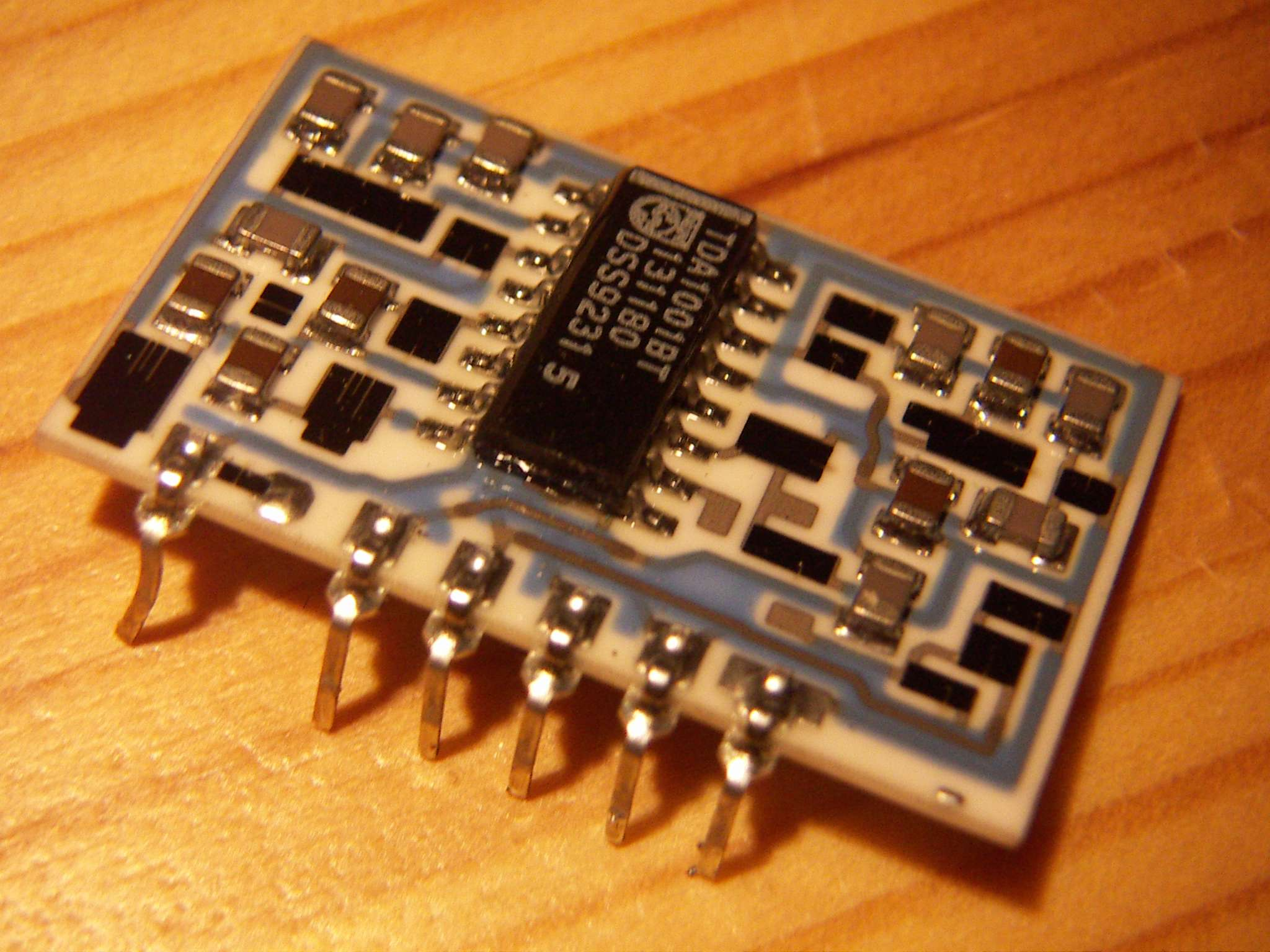 Ilmeisesti alumiinioksidia